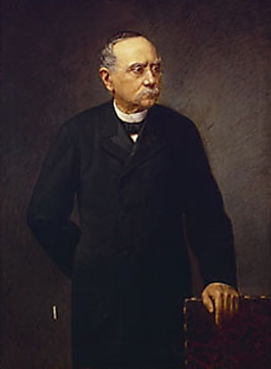 Leopold Ritter von Hasner wird in Dreiviertelansicht, etwas nach links gedreht, mit gestrengem Blick wiedergegeben. Der Präsident des Abgeordnetenhauses und Universitätsprofessor für Rechtsphilosophie und Nationalökonomie trägt einen schlichten schwarzen Gehrock. Seine linke Hand stützt er auf eine Stuhllehne, die rechte Hand hat er in den Rücken gelegt.